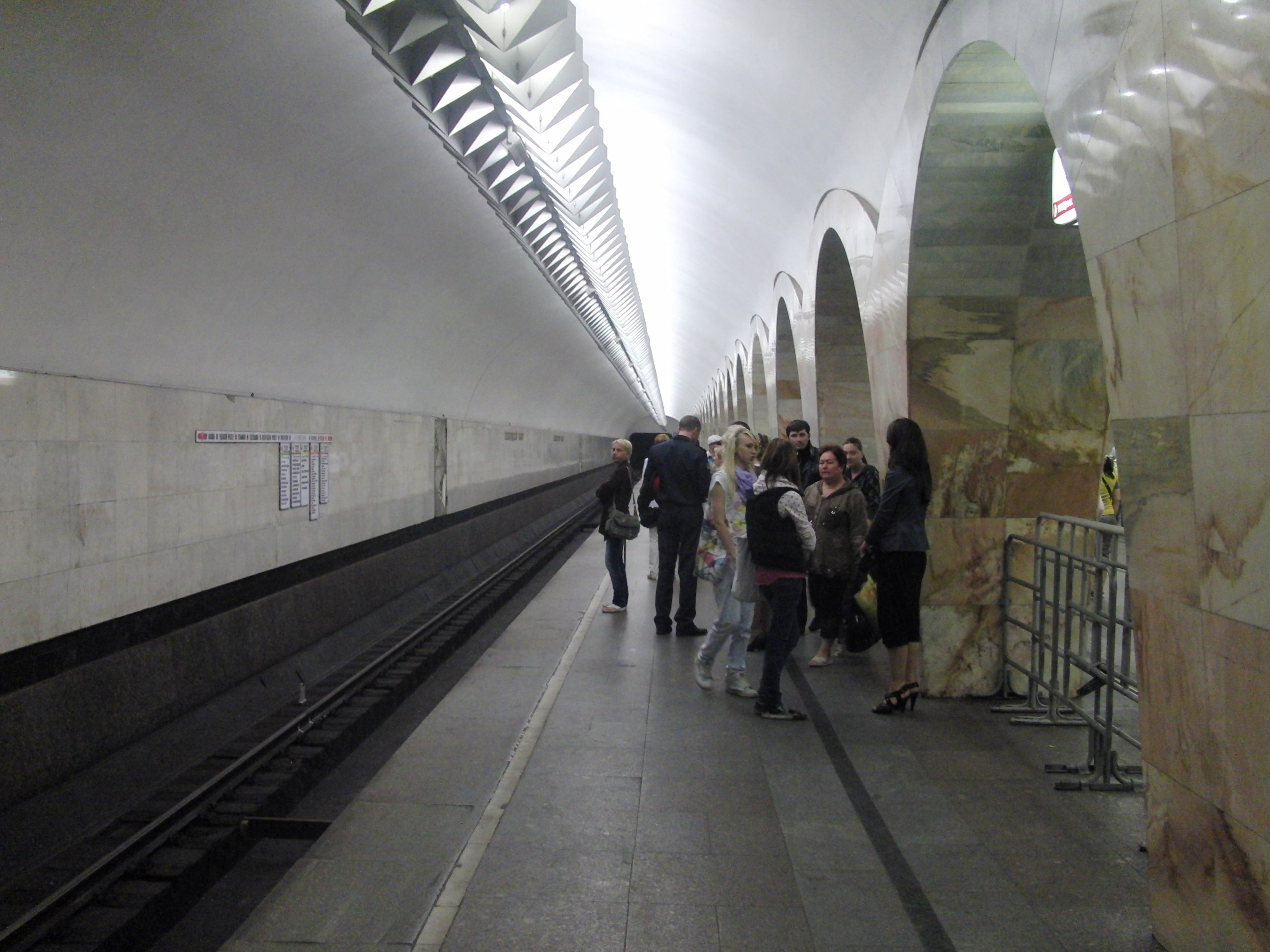 Kuznetsky Most (Кузнецкий мост)